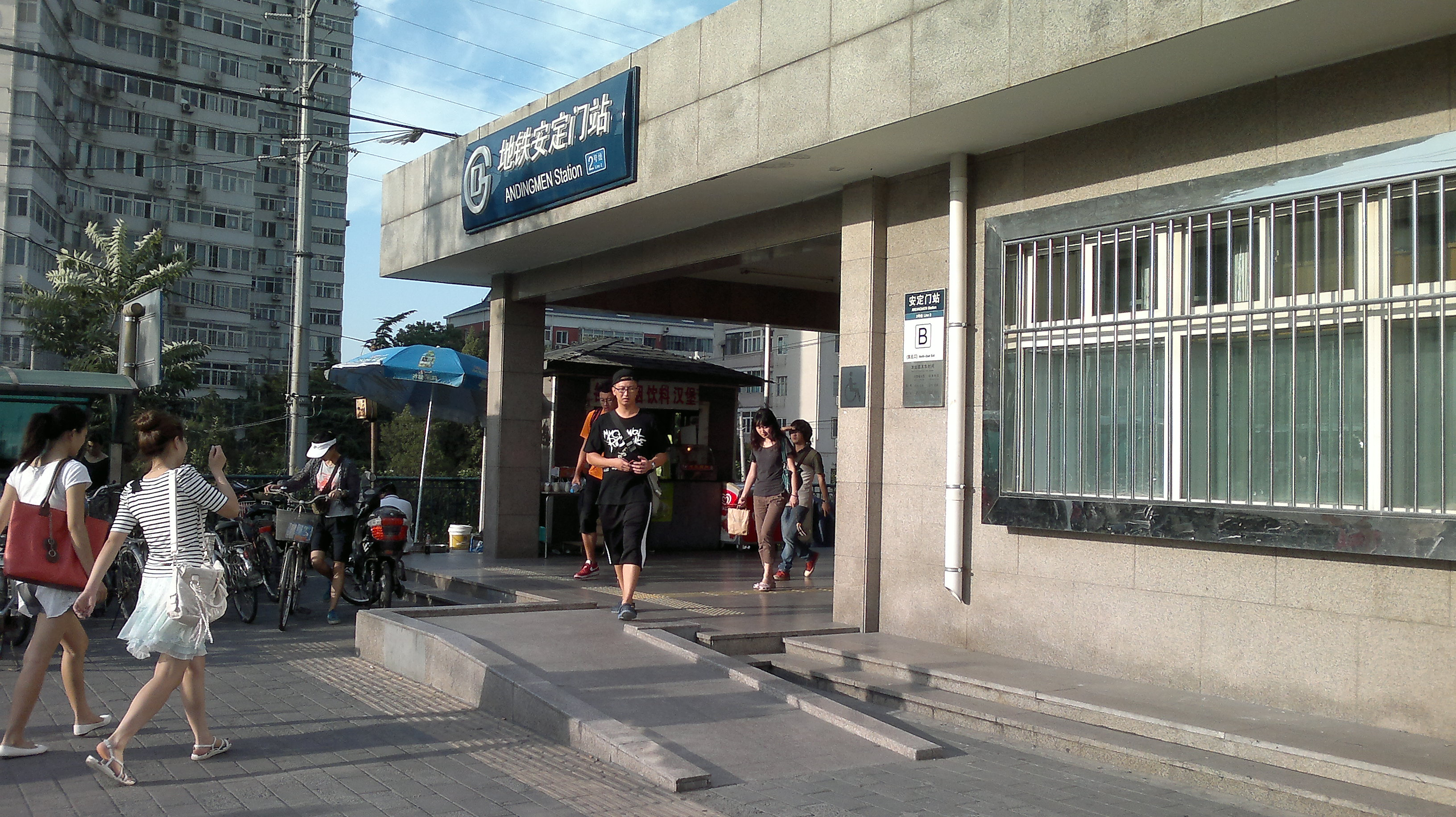 北京地鐵安定門站